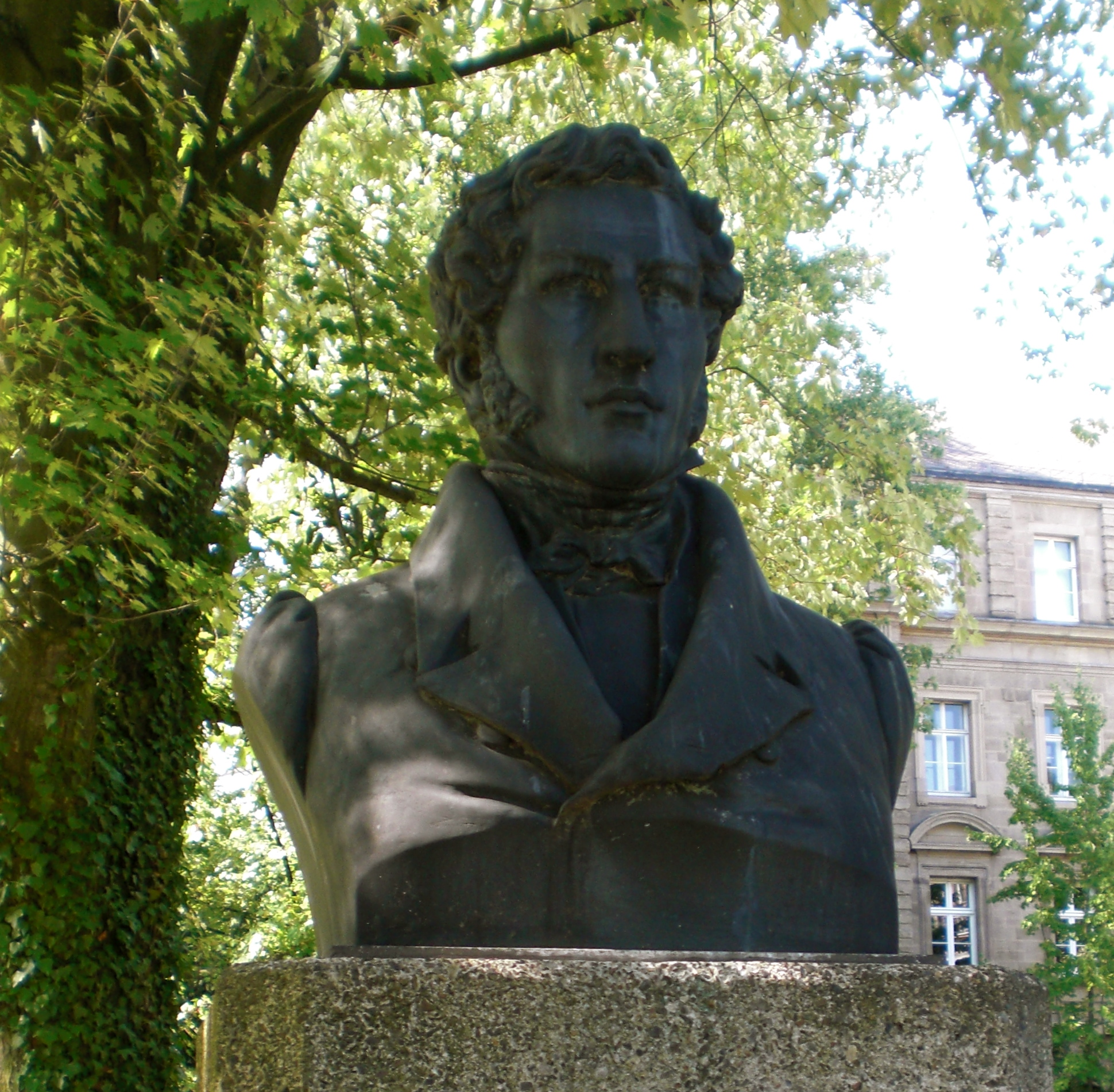 Büste von Karl Schomburg vor dem Ständehaus in Kassel. Nachguss nach einem Vorbild von Carl Echtermeier.